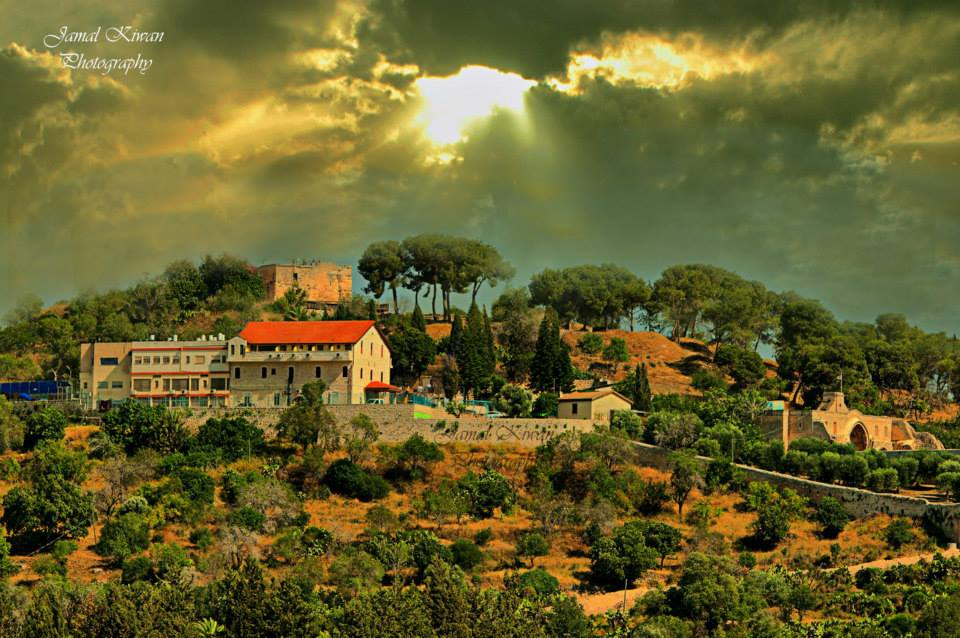 צִיפּוֹרִי הייתה עיר עתיקה במרכז הגליל התחתון, חמישה קילומטרים מצפון מערב לנצרת. יישוב היה קיים במקום כבר בתקופת הברזל II, ועיר יהודית התקיימה בו מתקופת החשמונאים ועד המאה ה-5 לספירה, כאשר יהודים ישבו באזור עד המאה ה-10. אתר ציפורי הוא גן לאומי המשתרע על שטח של כ-16 קמ"ר. הגן נפתח לציבור בשנת 1992. החפירות בגן טרם הסתיימו.